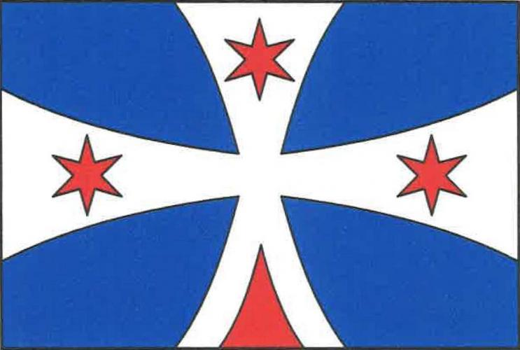 Popovičky vlajka